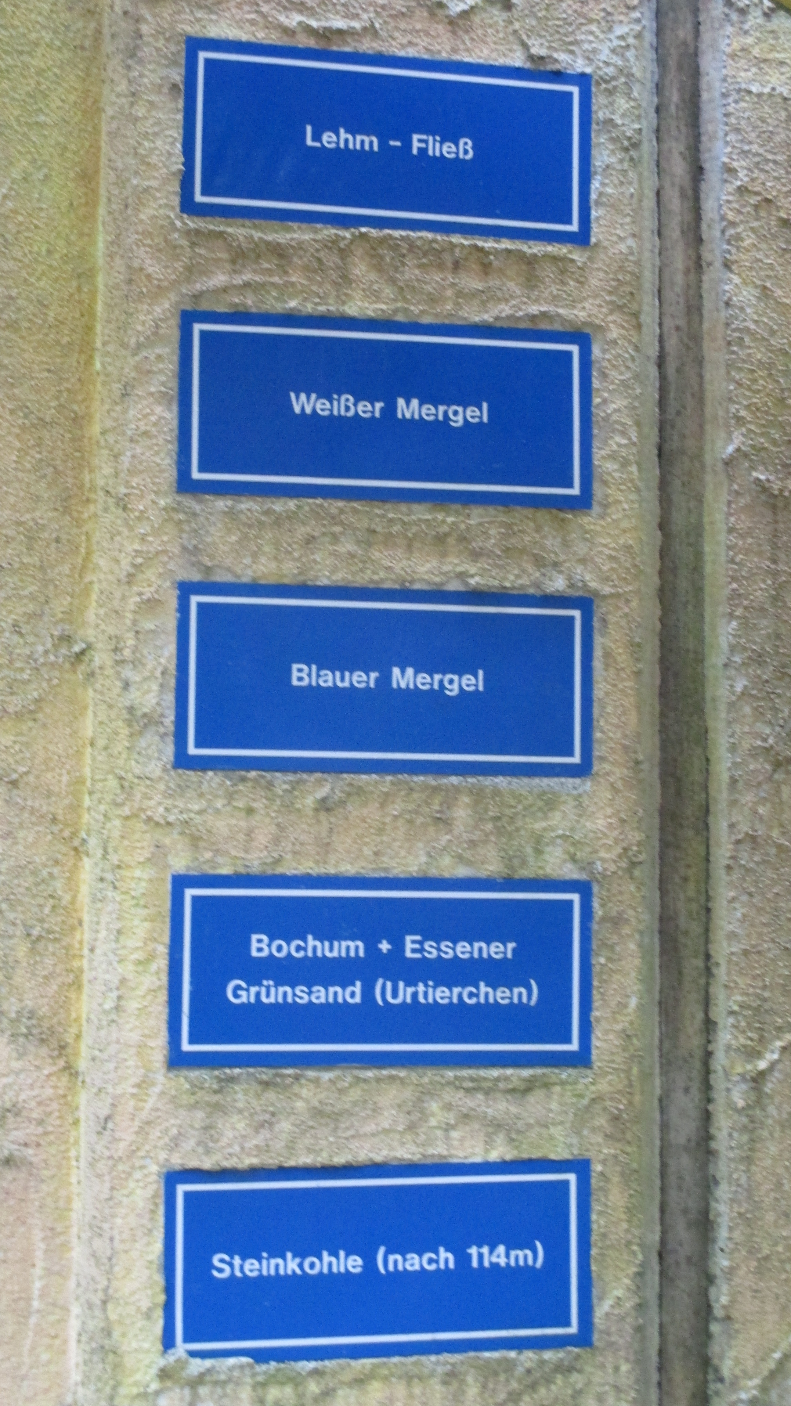 Infotafeln über Beisen und Zollverein Schacht 3/7/10 am Aufgang zum Erfahrungsfeld.